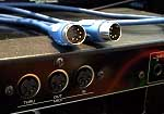 Typische MIDI-aansluitingen en een MIDI-kabel.